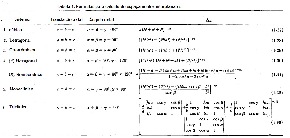 Tabela 1 geometria